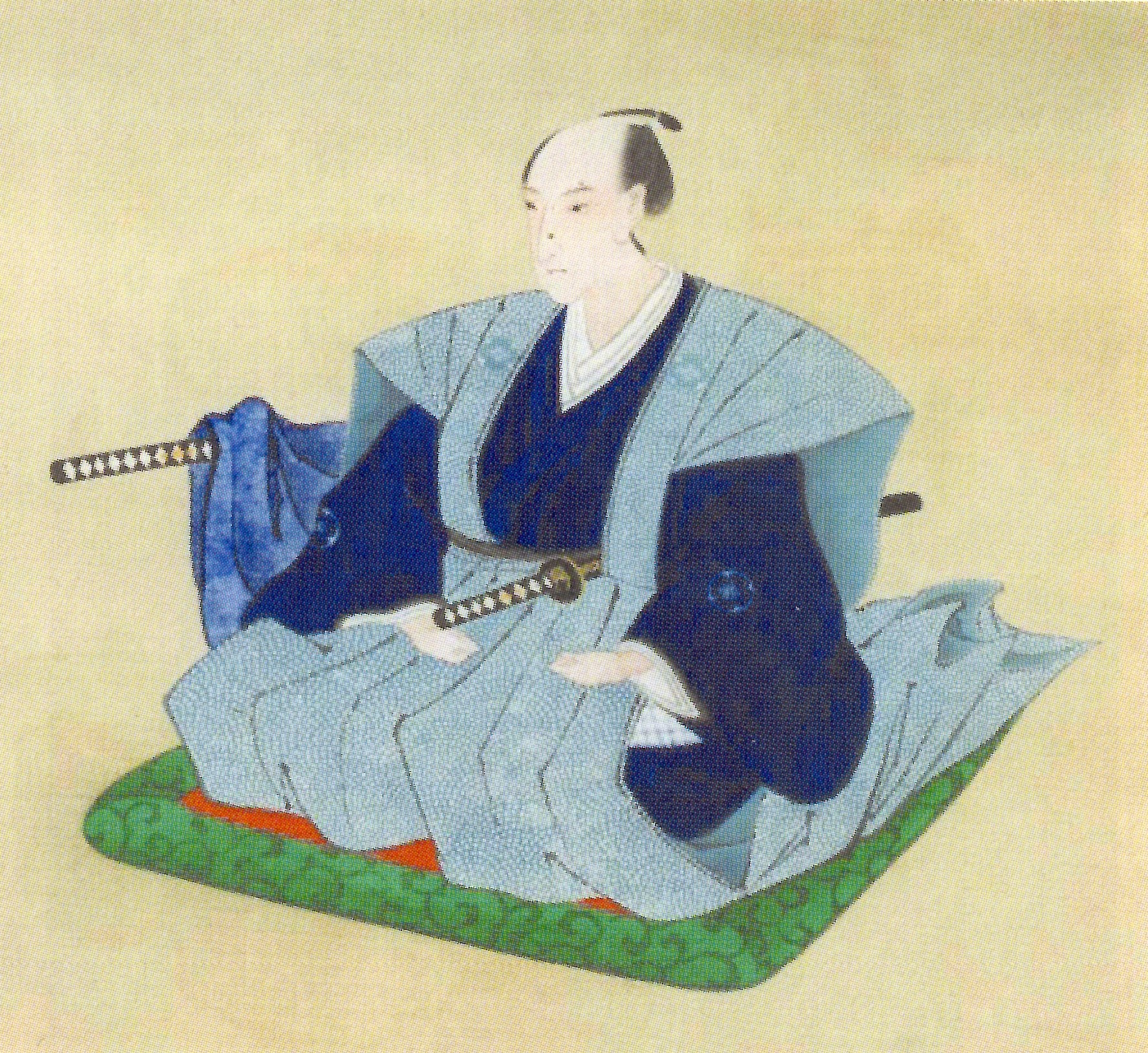 黒田直邦の肖像。